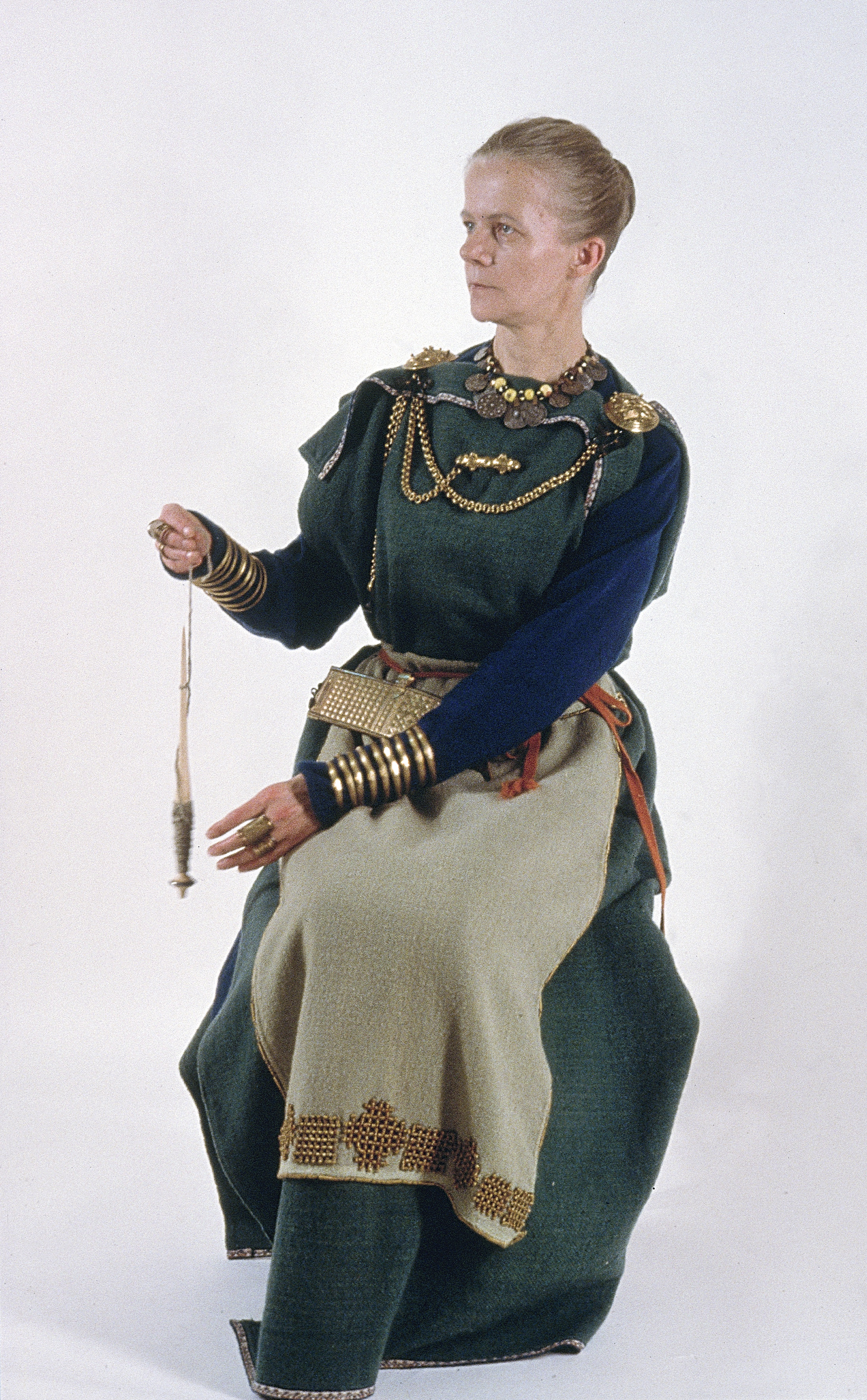 Euran muinaispuku, naisella värttinä. Museoviraston arkeologian kuvakokoelmasta.